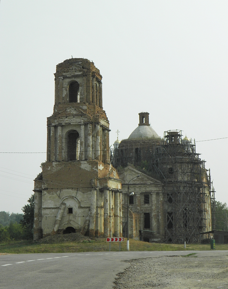 старыеЛЕСА